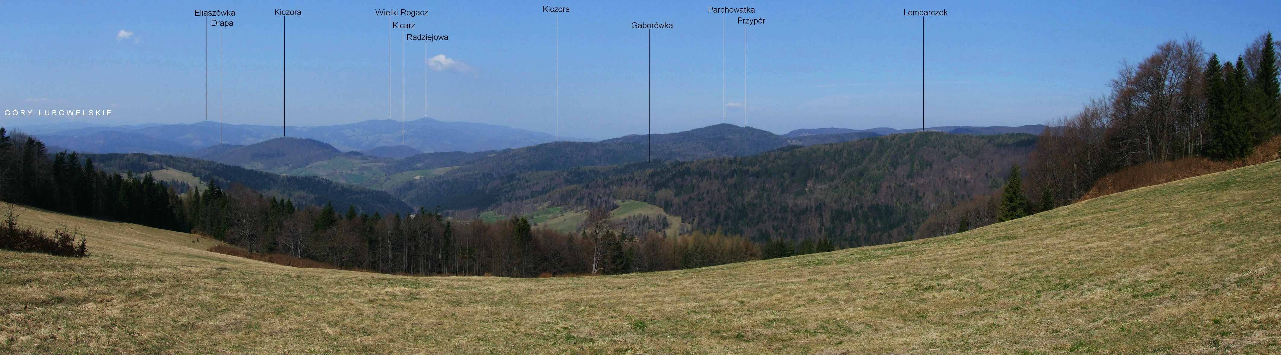 Widok z grzbietu Pusta Wielka-Runek